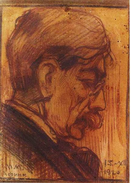 Drawing of Greek-Russian painter Nikolaos Himonas (1864-1929)